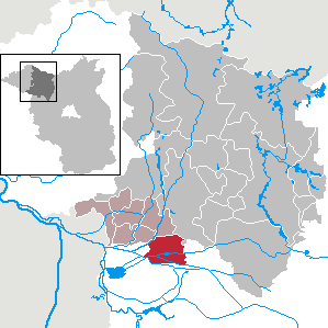 Dreetz in Brandenburg (Country) - District Ostprignitz-Ruppin